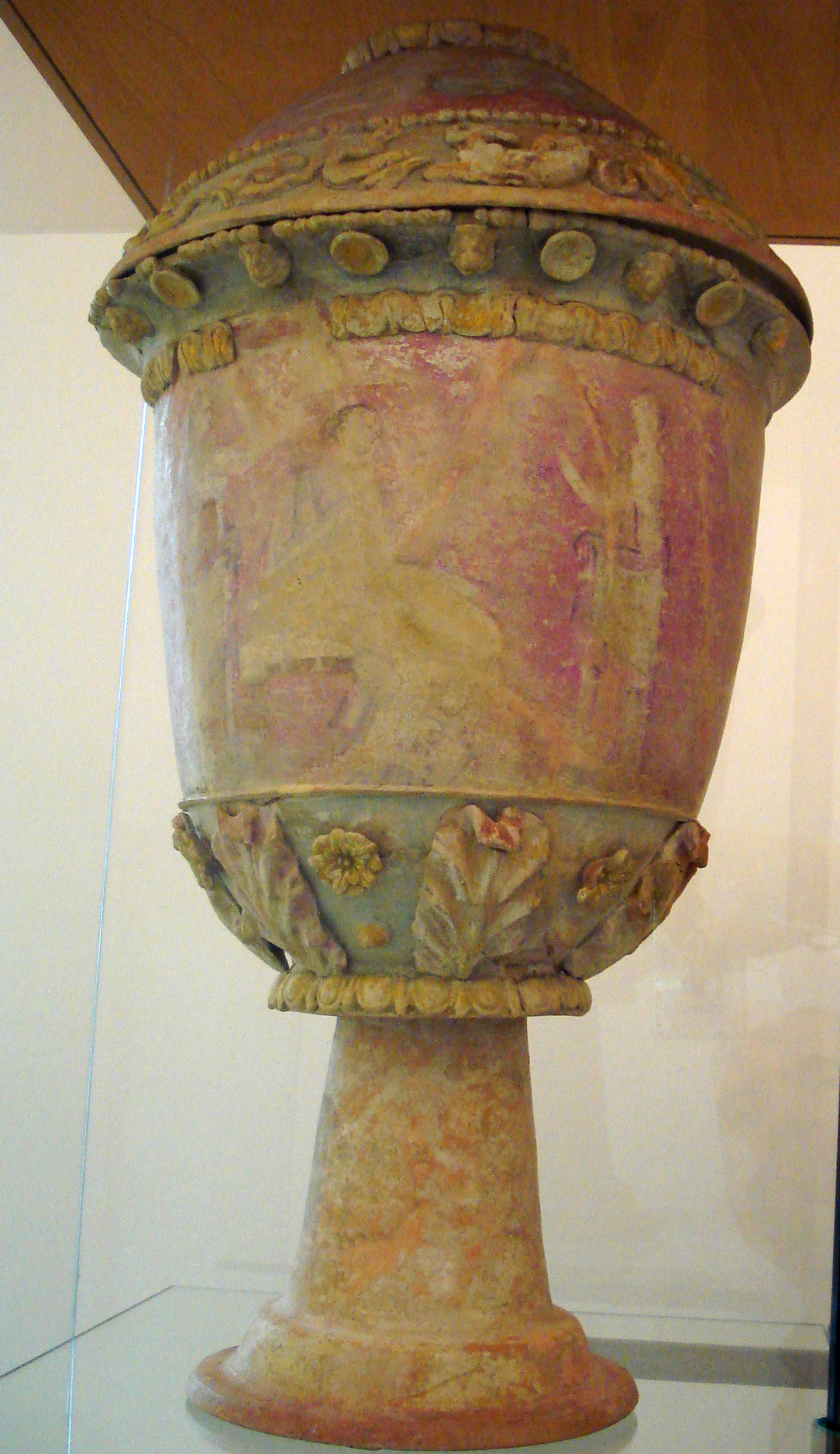 "Vaso centuripino" (280/220 a.C.), esempio della splendida e caratteristica produzione di terracotta policroma ellenistica di Centuripe (Enna). Museo archeologico regionale di Palermo, 28 settembre 2006. Foto di Giovanni Dall'Orto.